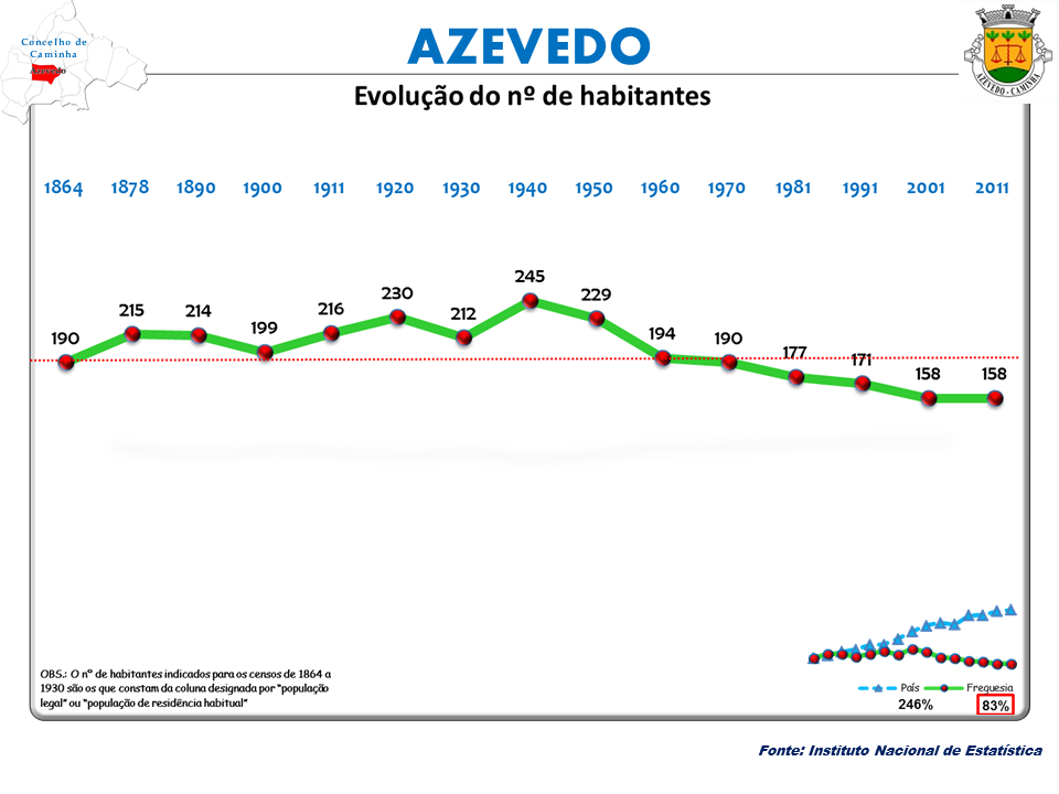 Censos 1864/2011